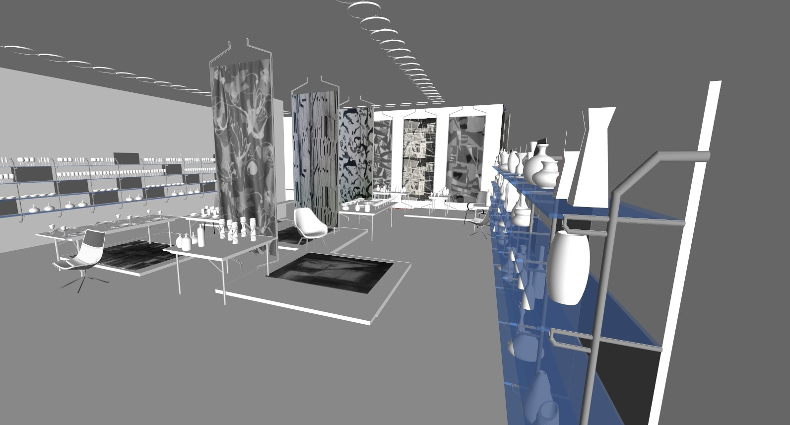 Template:ScreenshotCopyrighted